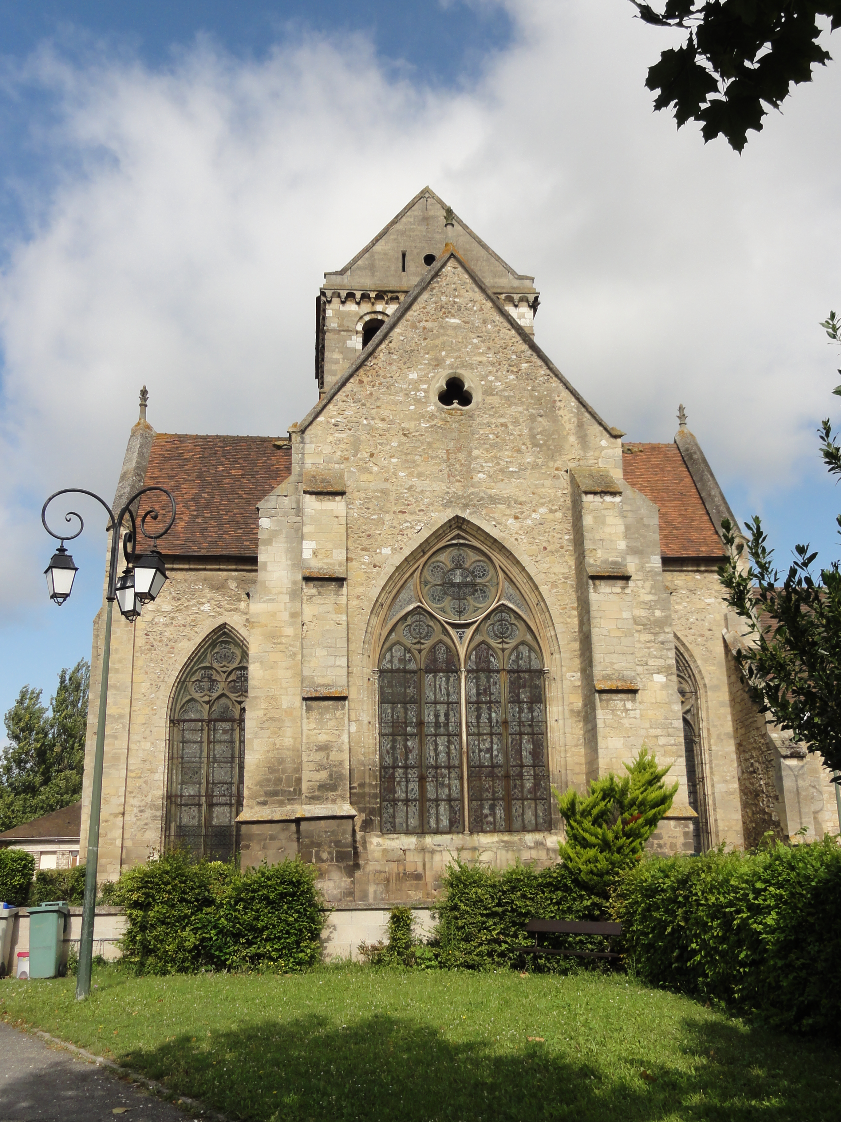 Chevet.